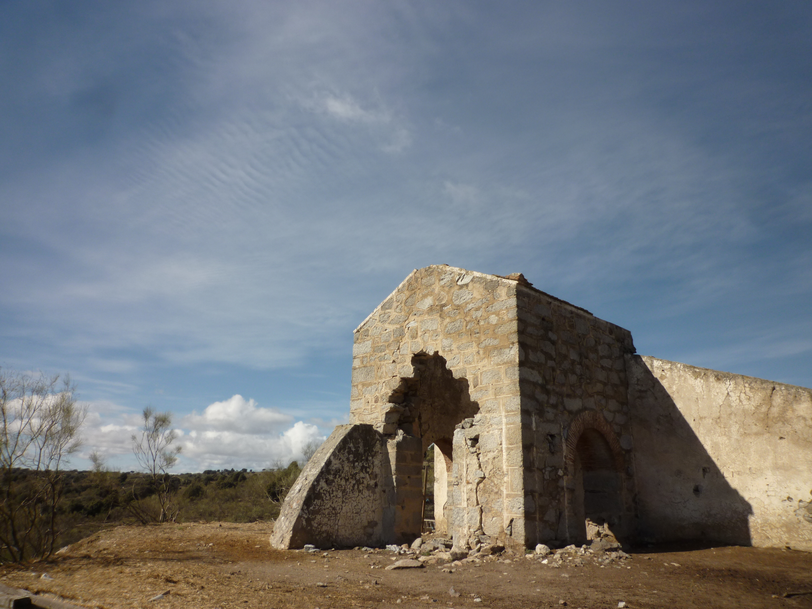 Pozo de la Mina.